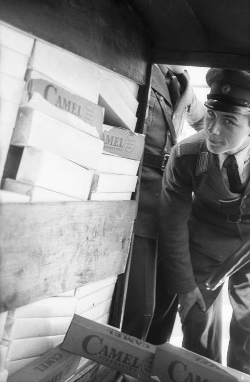 Schwarzer Tag für Sektorenschieber Am 3.5.1949 wurden an der Sektorengrenze in der Leipziger Strasse und Unter den Linden von der Volkspolizei drei Lastkraftwagen mit doppelten Böden bzw. doppelter Wand, die insgesamt 2500 Tafeln Schokolade, 60000 amerikanische Zigaretten und 25 Ztr Zement geldaden hatten, sichergestellt. Die Ware sollte in die Westsektoren verschoben werden. UBz: In diesem LKW waren 34000 amerikanische Zigaretten enthalten. Zentralbild/Kemlein, 4.5.1949 3178-49